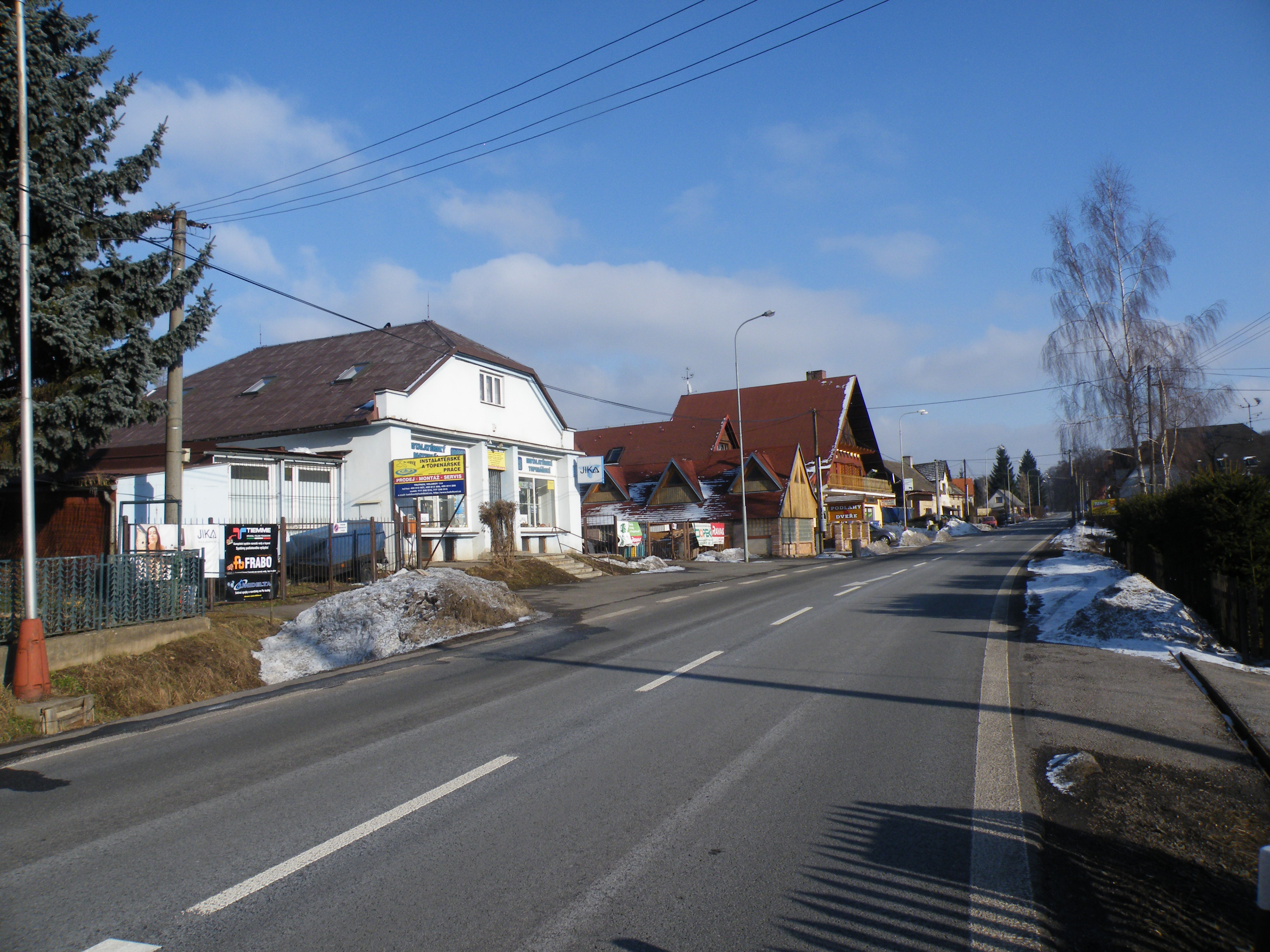 Trutnov - VoӀanov místní zástavba